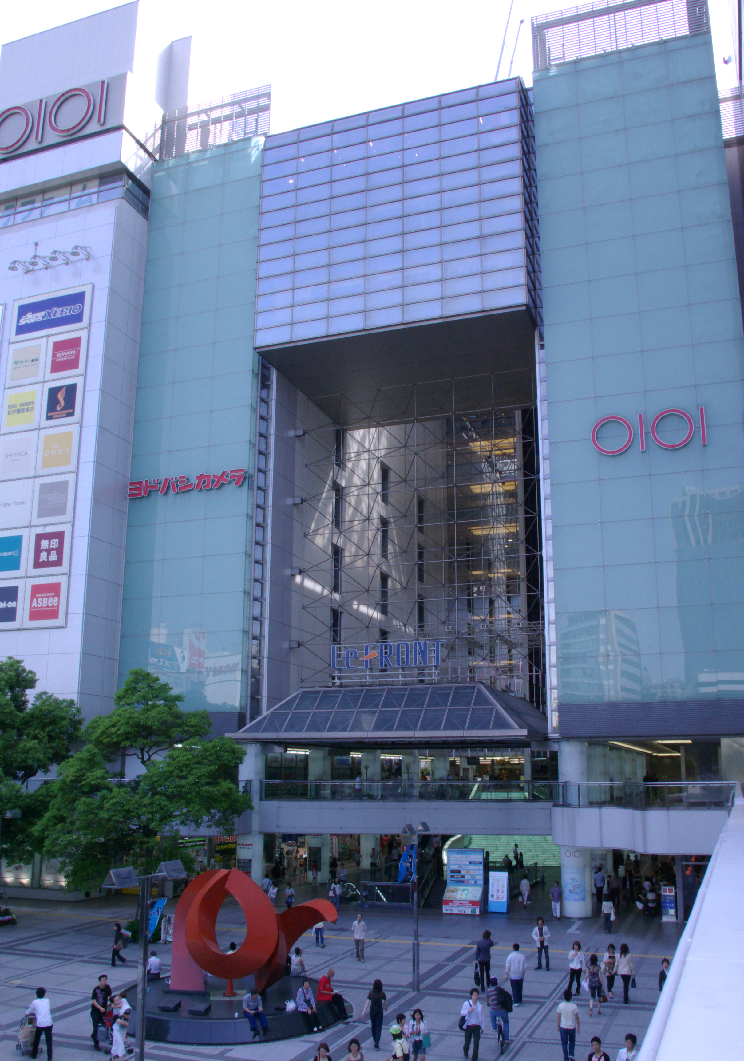 Kawasaki LeFRONT (Kawasaki, Kanagawa, Japan)